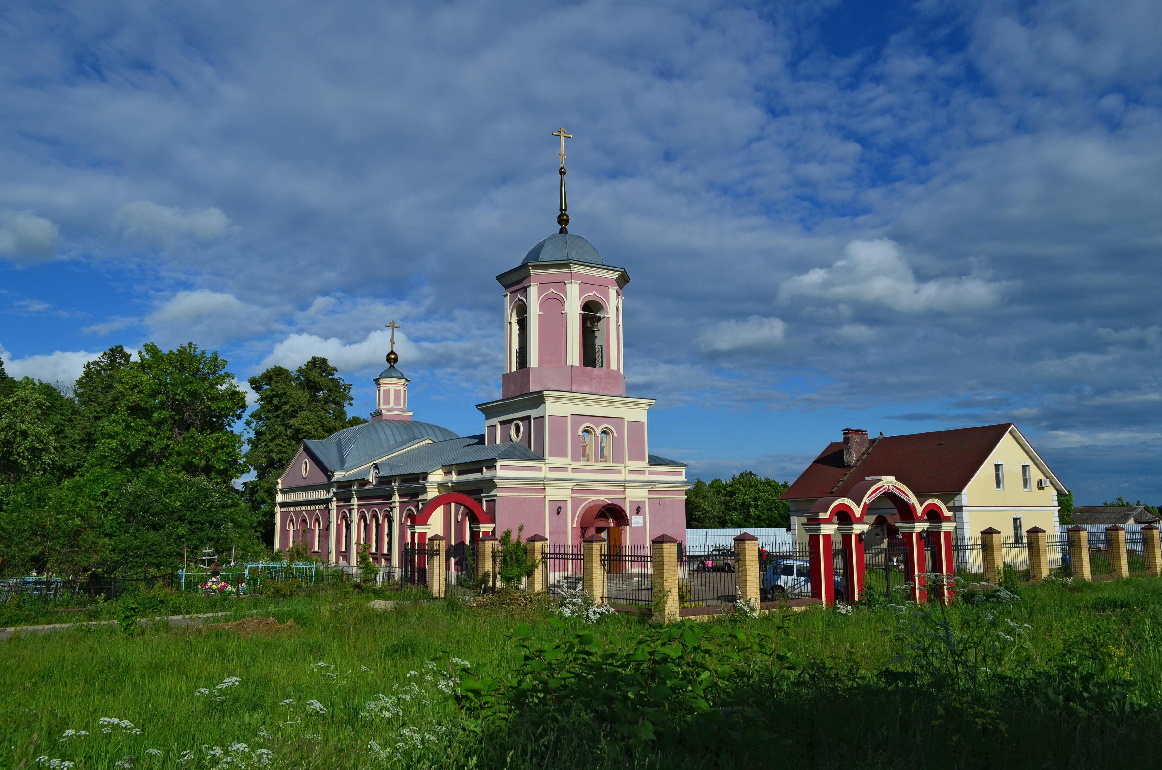 Рязанская область,Рыбновский район,село Большое Жоково.Тихвинская церковь.